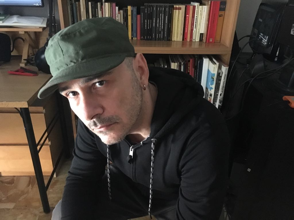 Emiliano Rubbi